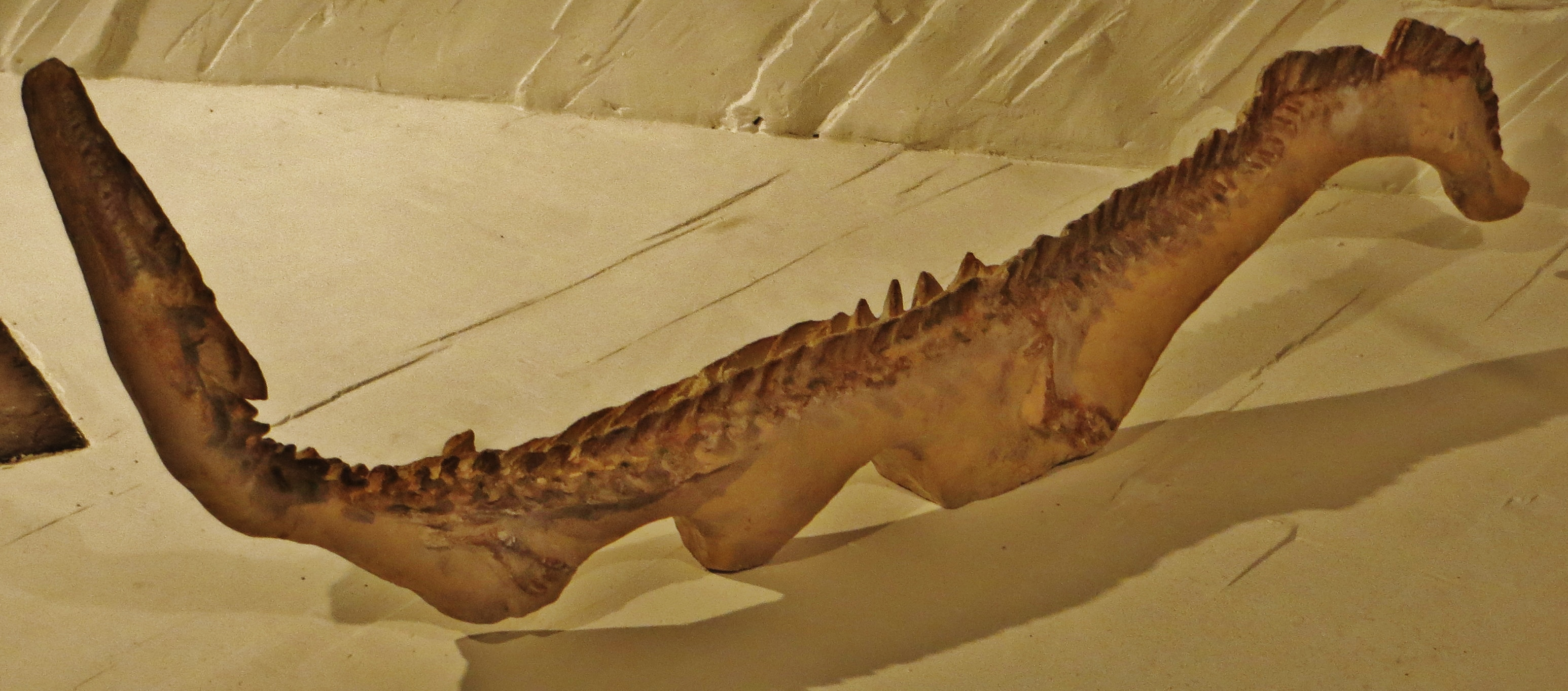 Fossil - Took The picture at Royal Belgian Institute of Natural Sciences, Brussels